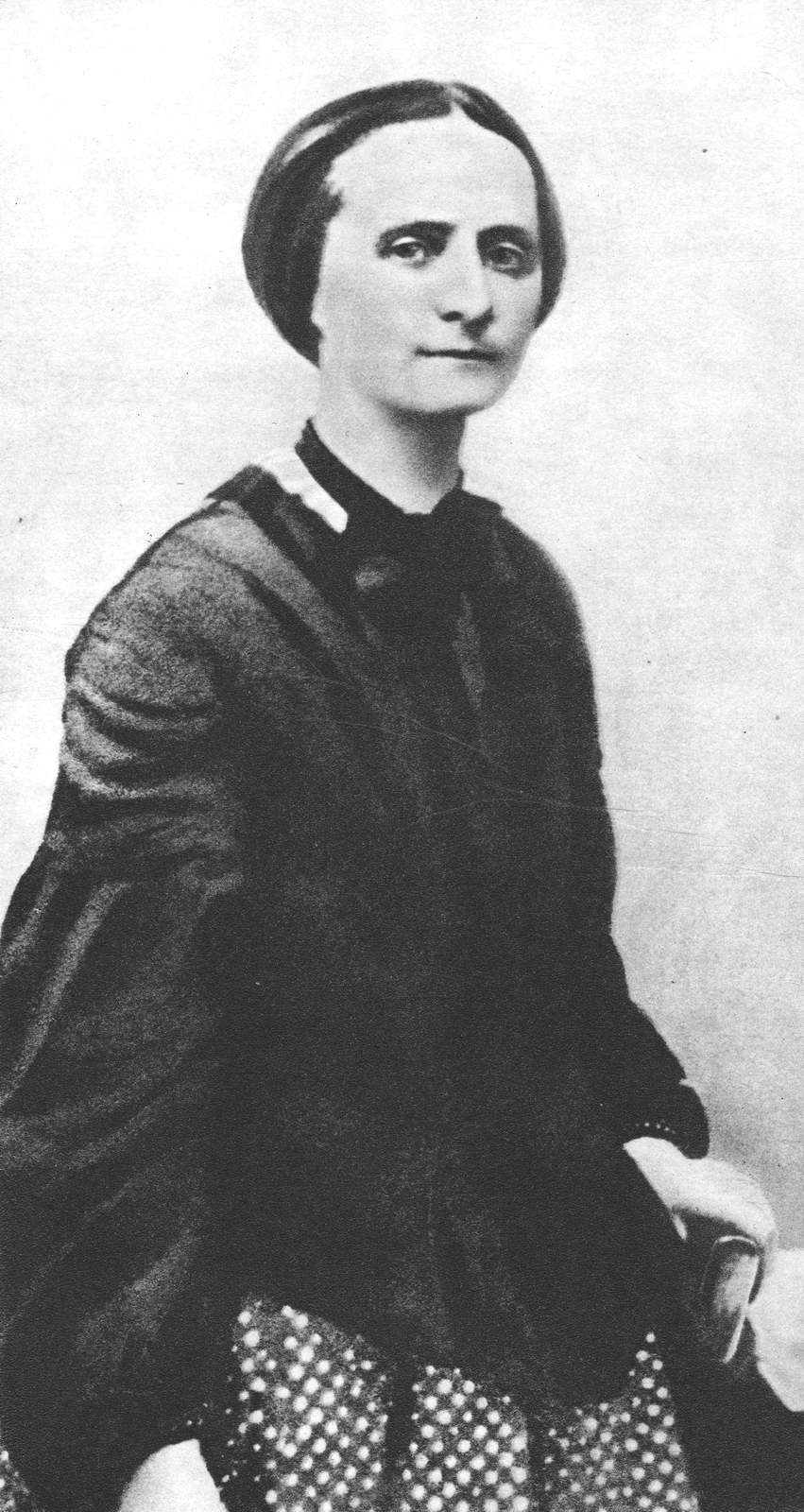 Božena Němcová (1820–1862); Foto um 1860